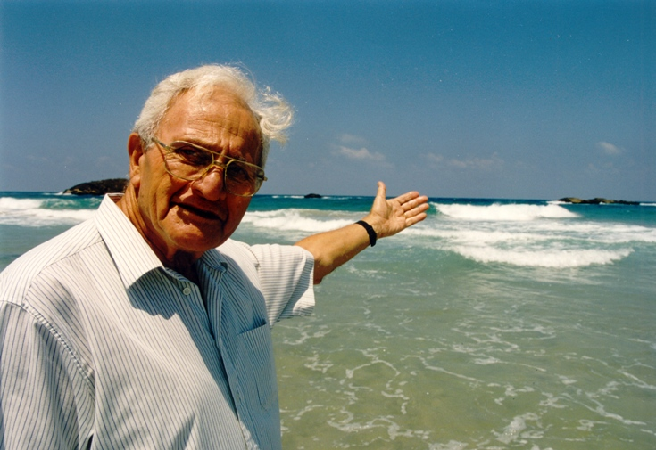 אלישע לינדר ארכאולוג ימי ישראלי בחוף מעגן מיכאל